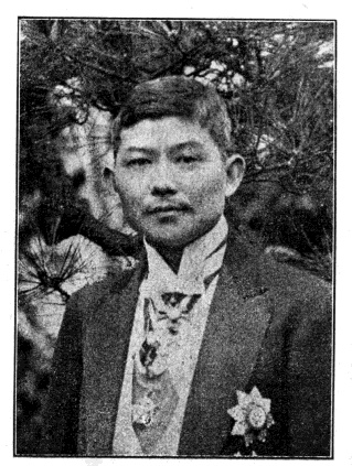 中華民國國會議員